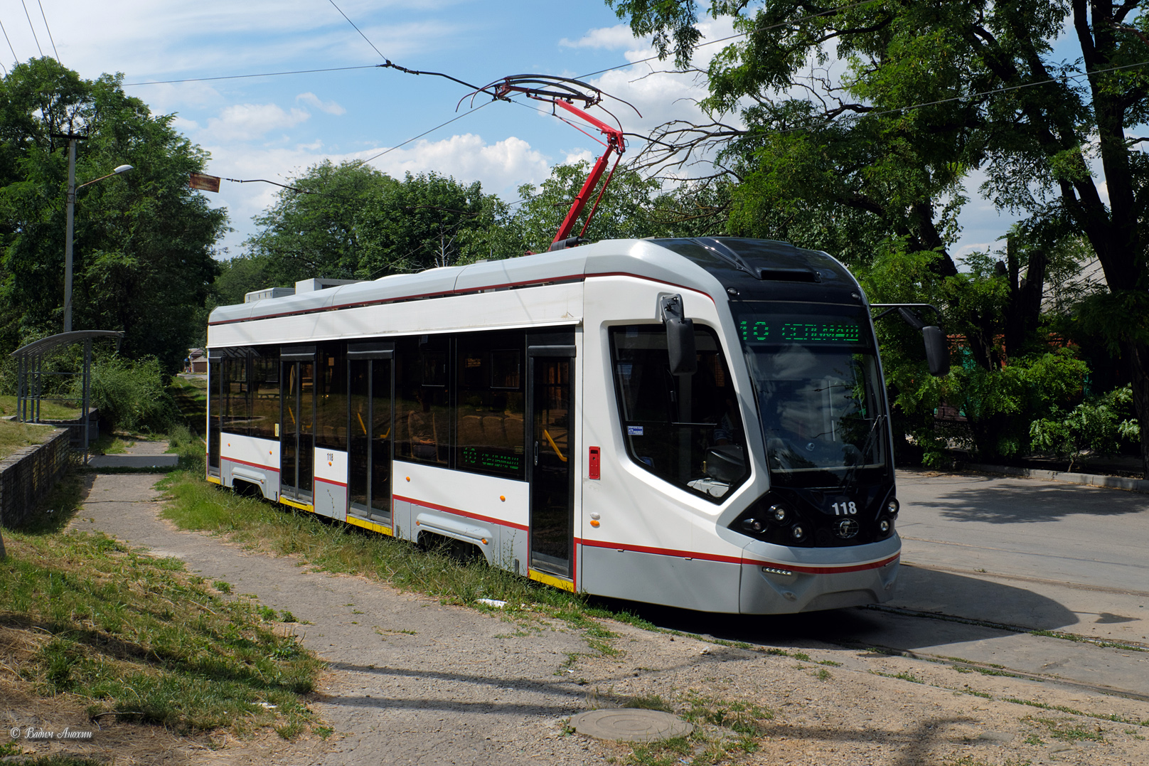 Трамвай 71-911E производства ПК "Транспортные Системы" в Ростове-на-Дону.